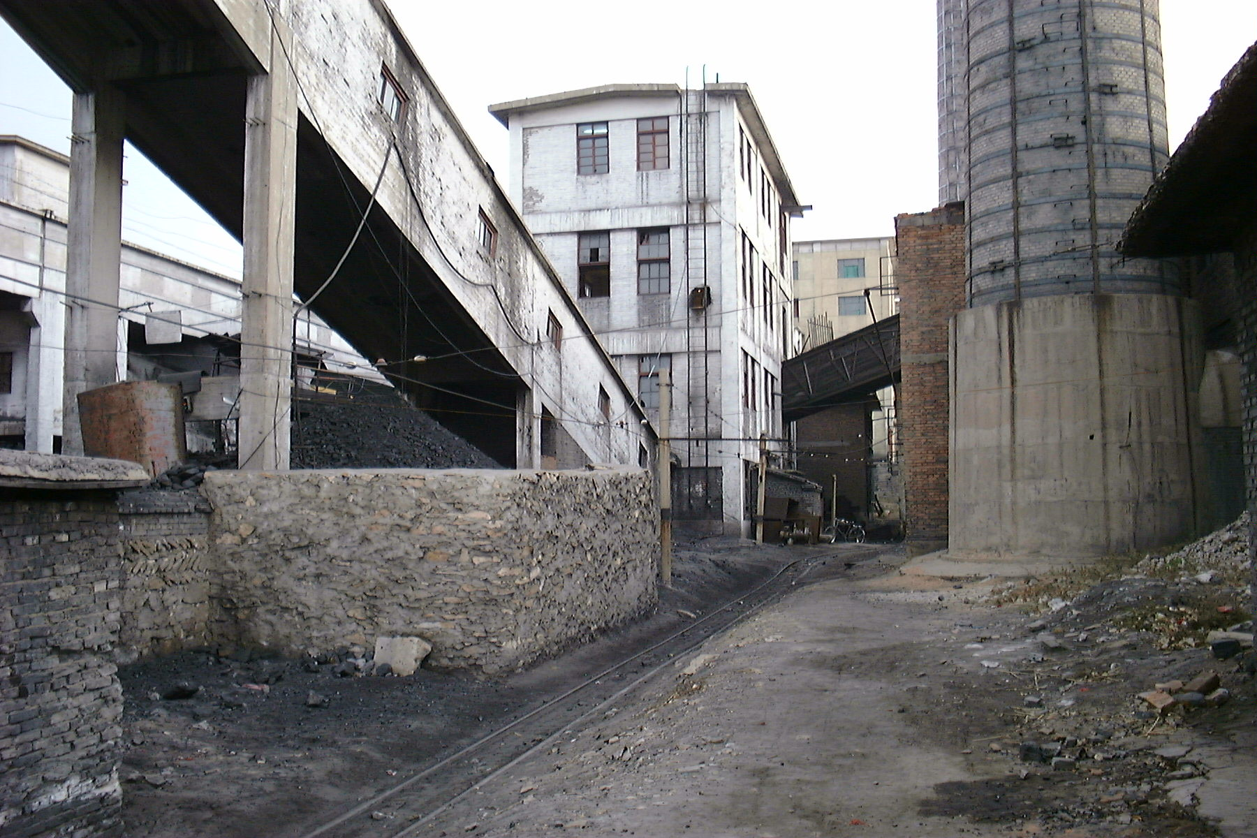 Jin Hua Gong Mine, Datong, Shanxi, China